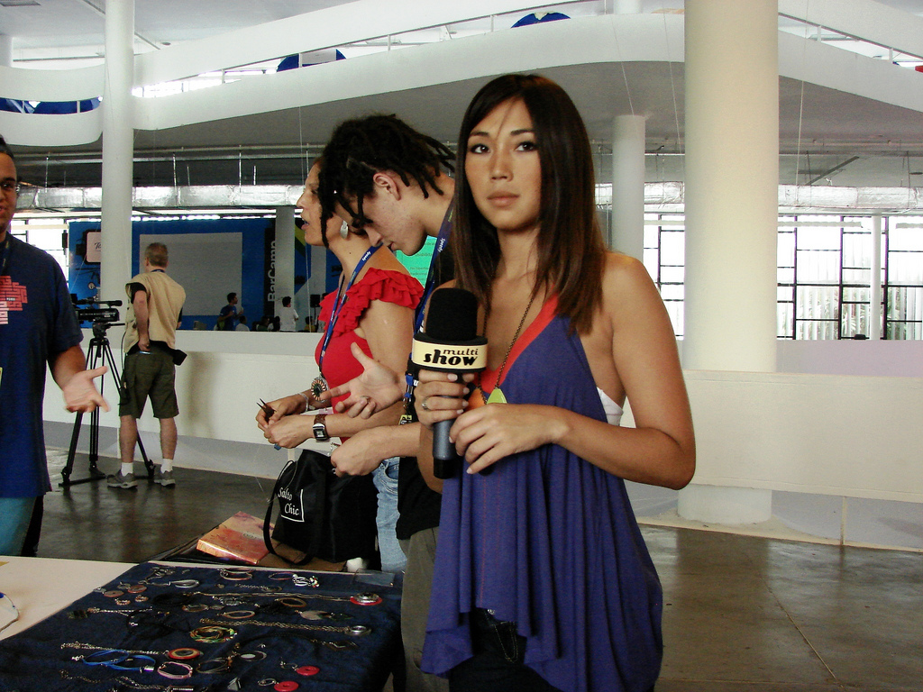 A atriz e apresentadora brasileira Daniele Suzuki no Campus Party Brasil 2008.